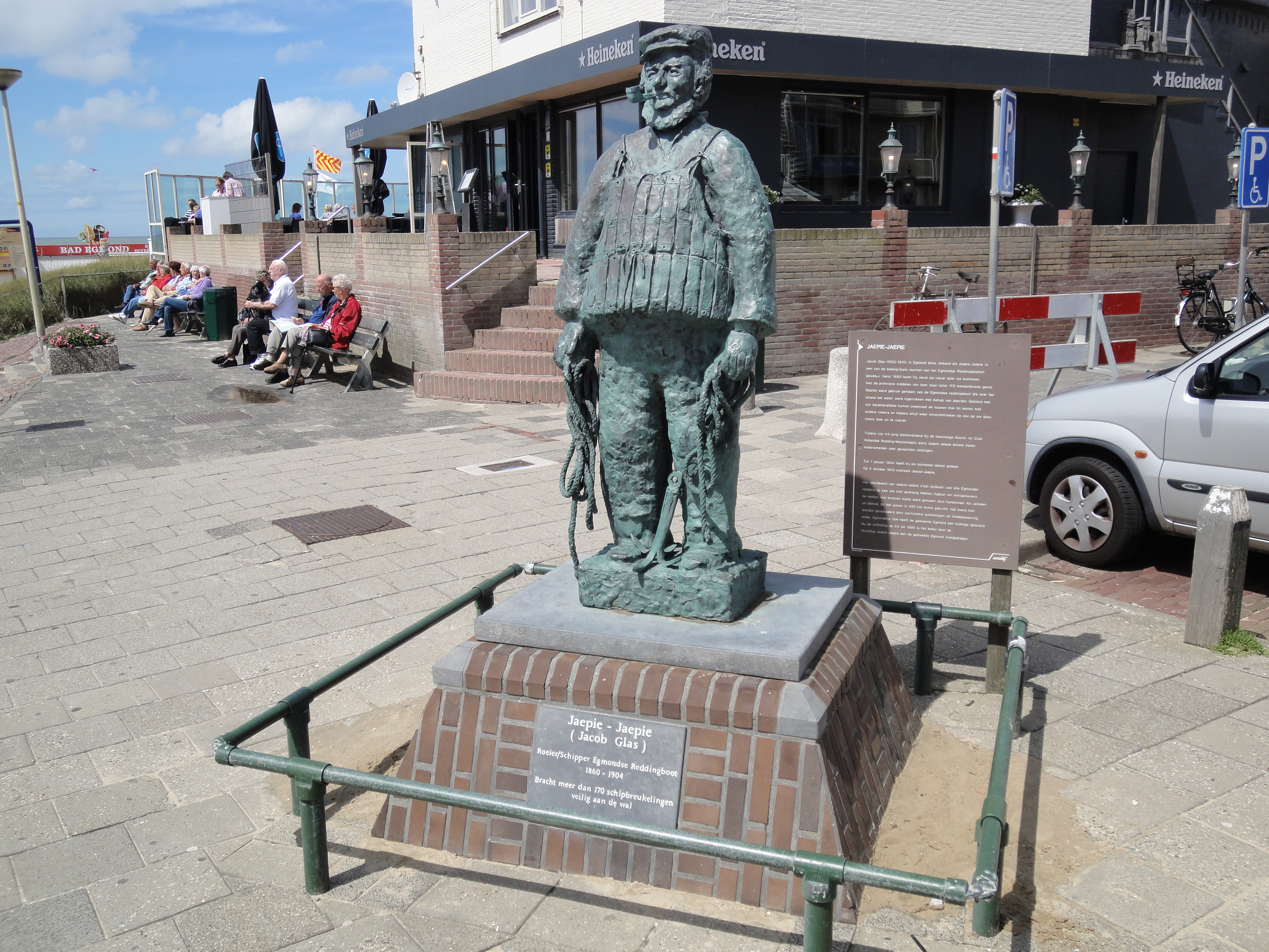 Der Seenotretter Jaepie-Jaepie